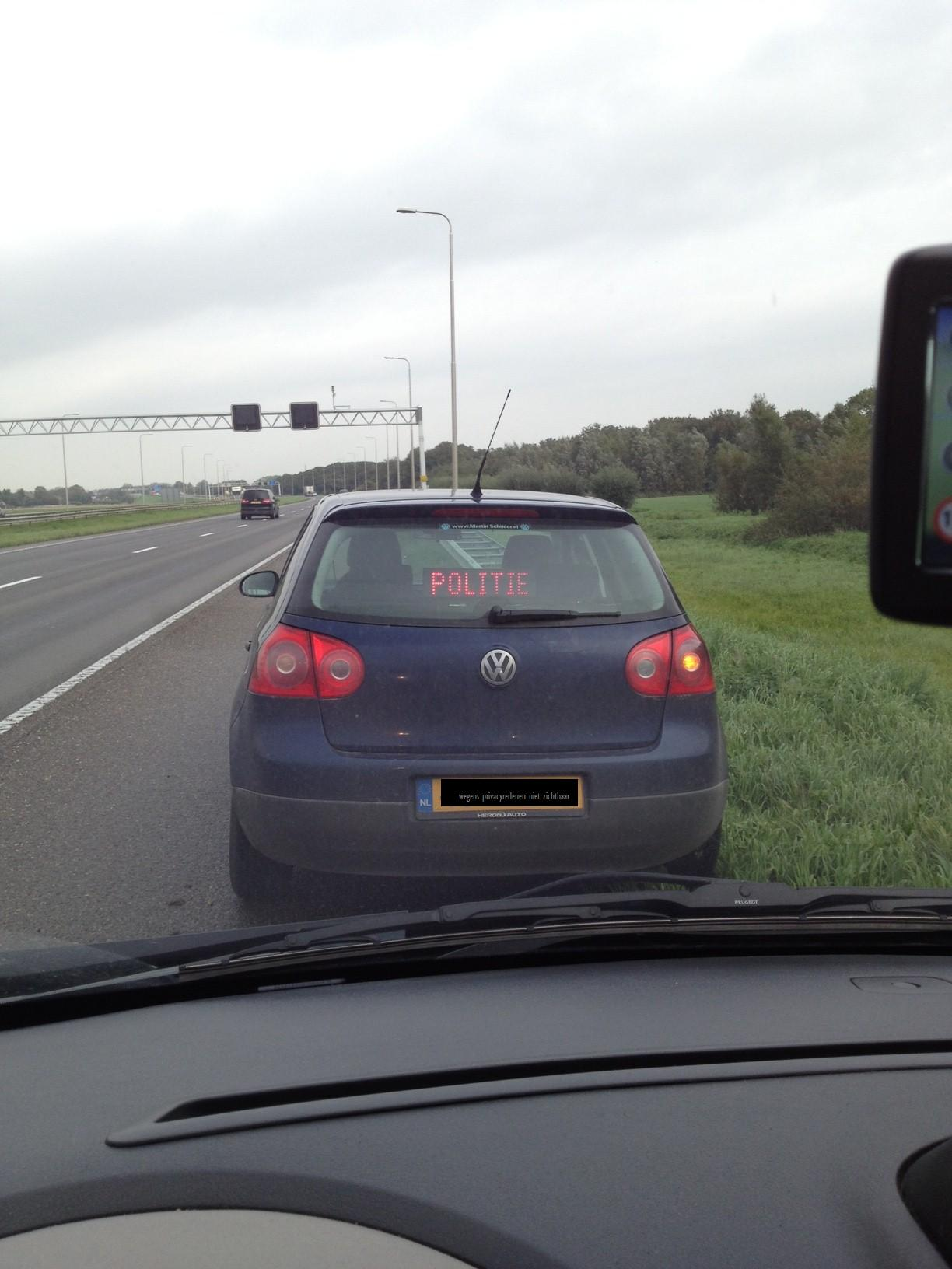 Deze meneer gaf mij een hele fijne boete van 227,- euro :-)